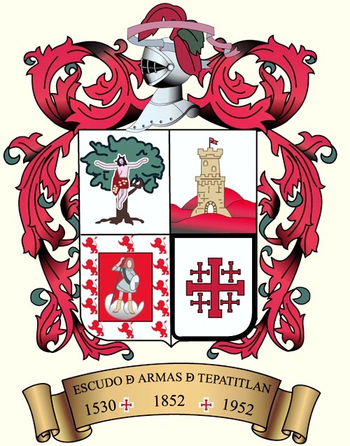 Escudo de Armas